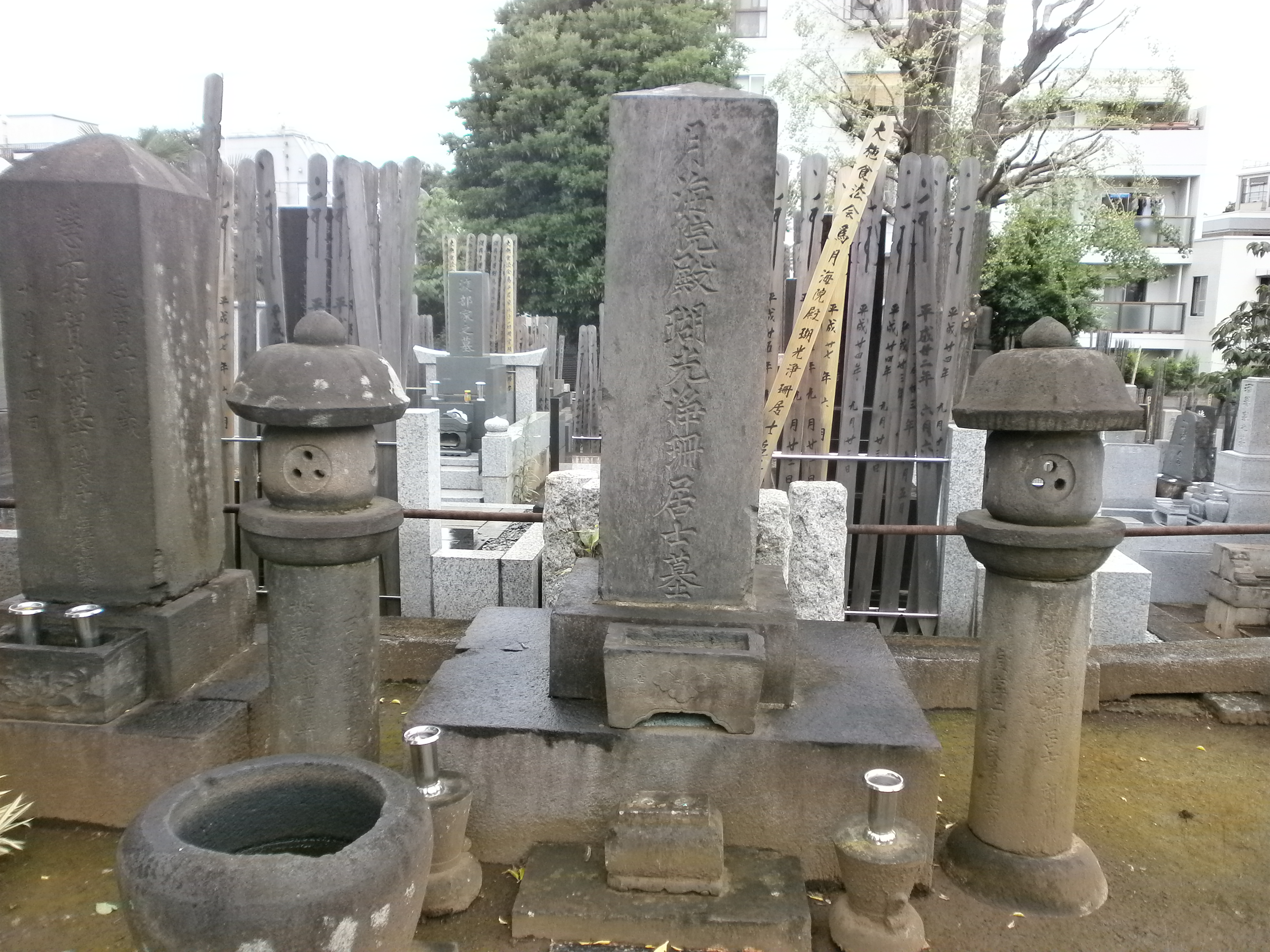 山鹿流の祖・山鹿素行先生の墓（東京都新宿区・宗参寺）